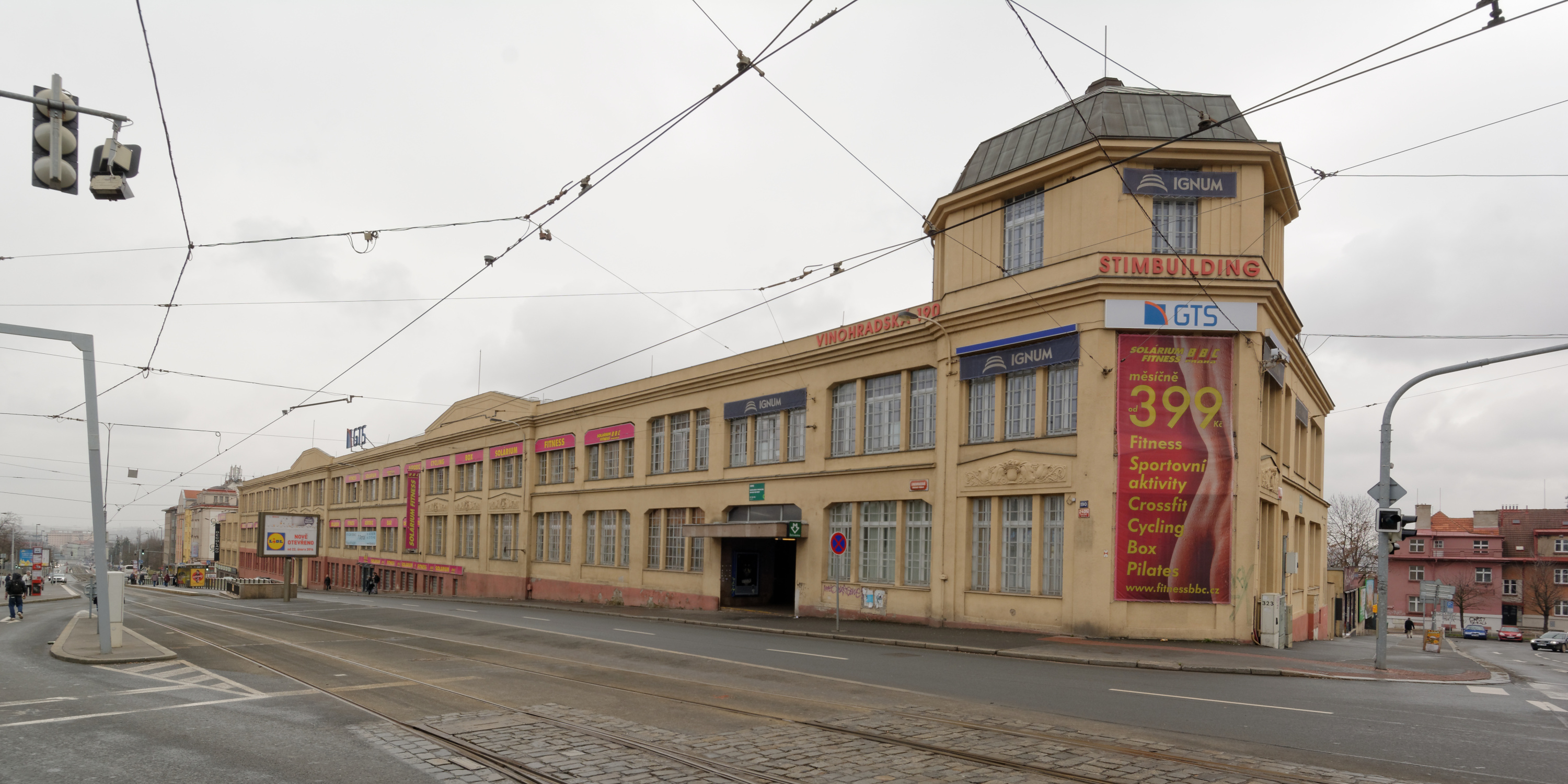 Průmyslový objekt čp. 2405, Vinohradská 190. Původně papírna Ignáce Fuchse. Postavil v roce 1911 Bruno Bauer.